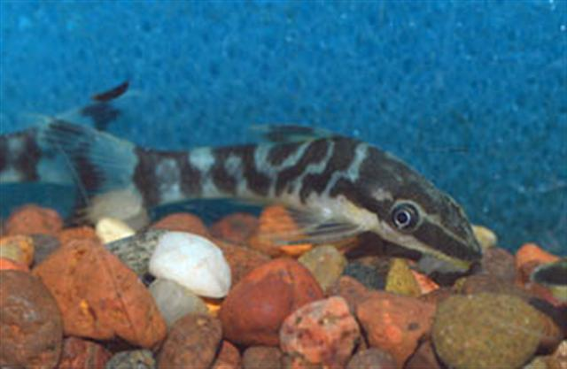 Otocinclus cocama USA, aquarium specimen